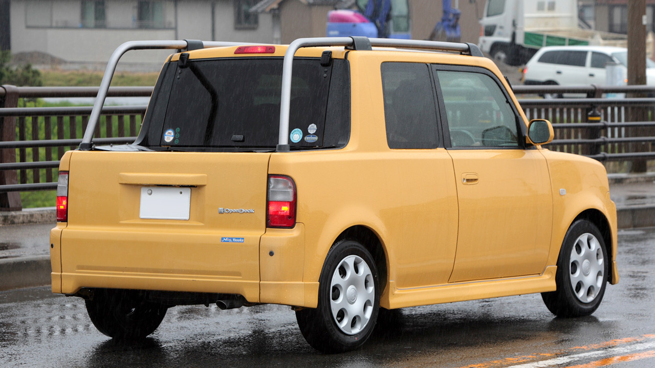 Toyota bB Open Deck ( NCP34 )